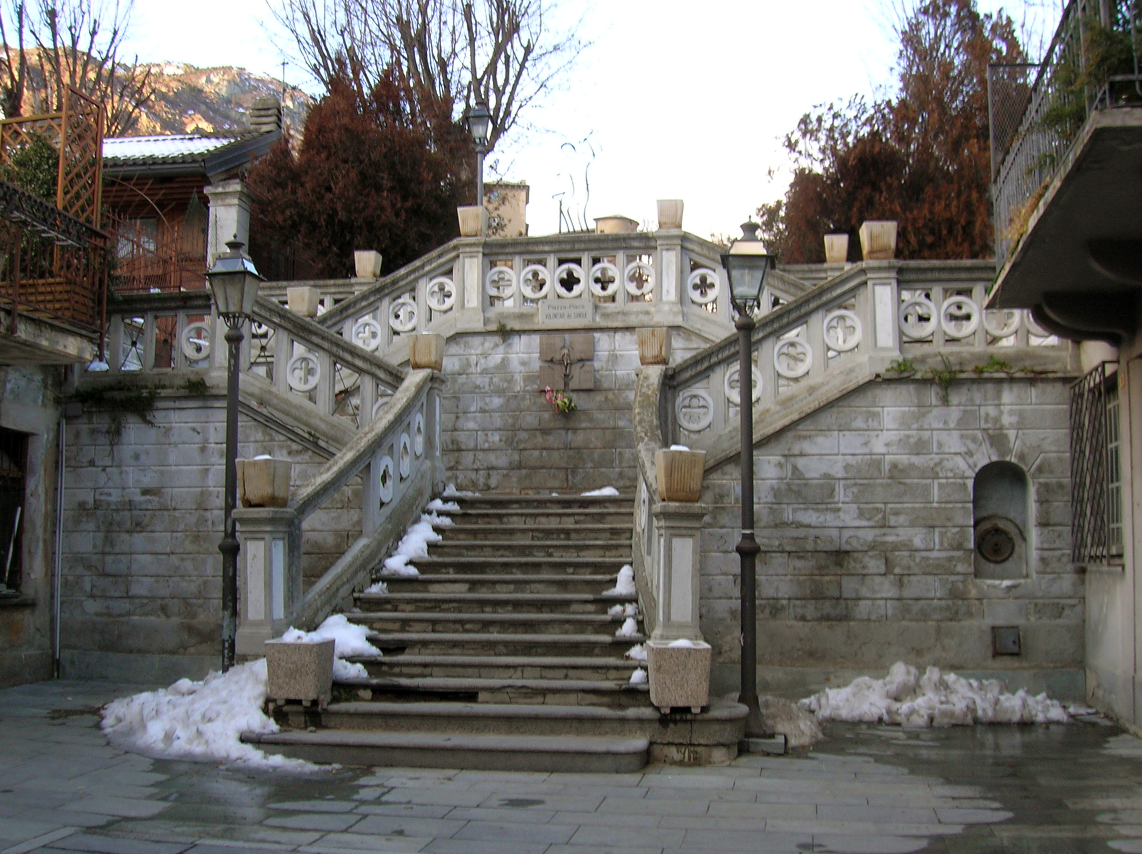 Scalinata tra Piazza Caduti della patria e Piazza Volontari del Sangue. Châtillon, Valle d'Aosta, Italia.